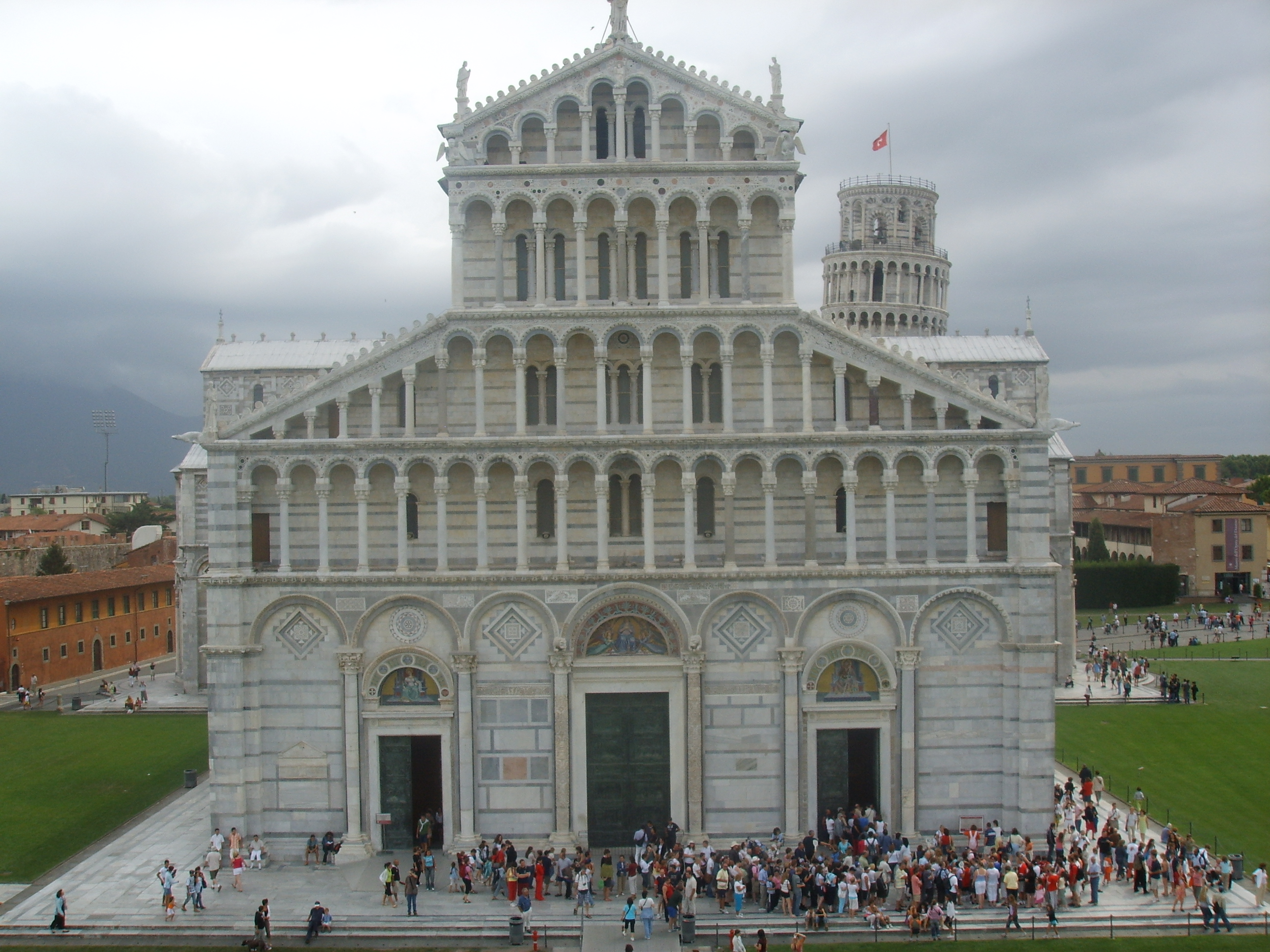 Duomo di Pisa, facciata in Pisa, italy